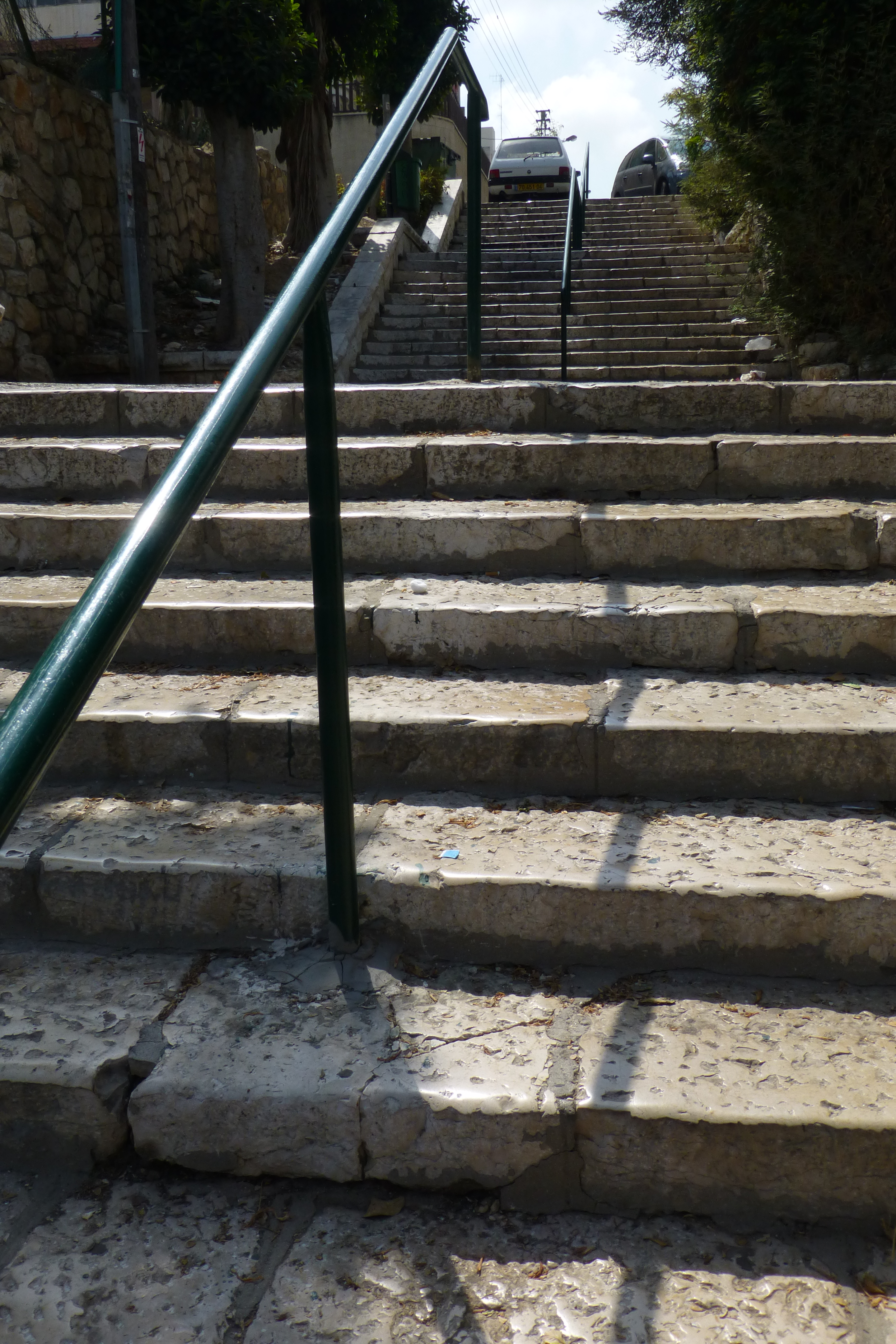 מדרגות הנביאים בחיפה